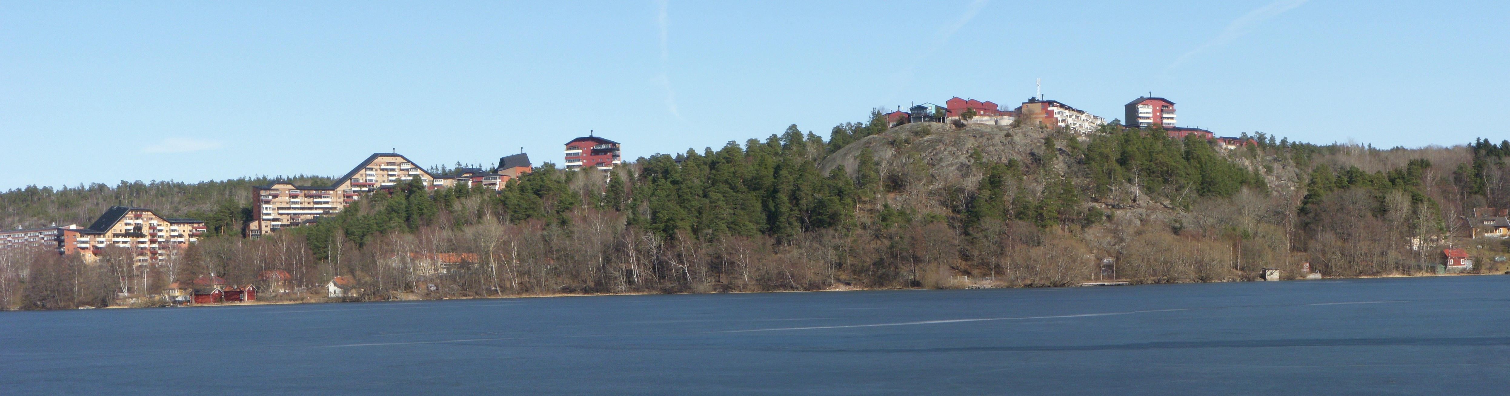 Bebyggelsen på Myrstuberget, vy över Albysjön